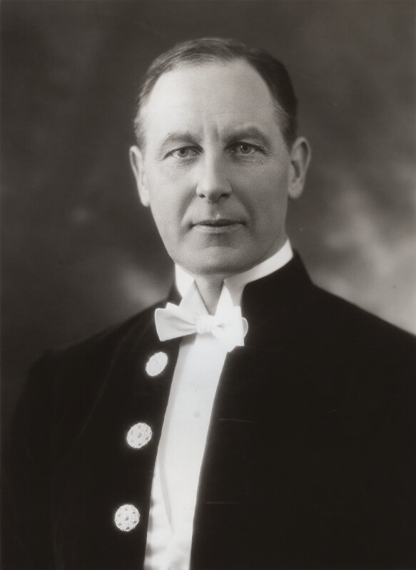 Lord Marchwood